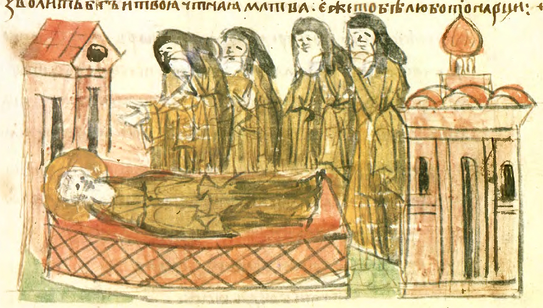 Смерть Феодосія (1074)